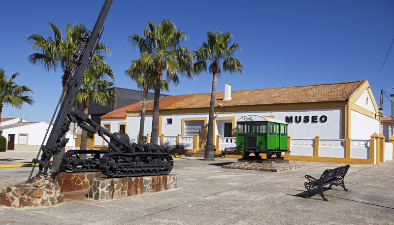 Espacio expositivo de Colecciones de Tharsis y antiguo hospital de la Compañía.